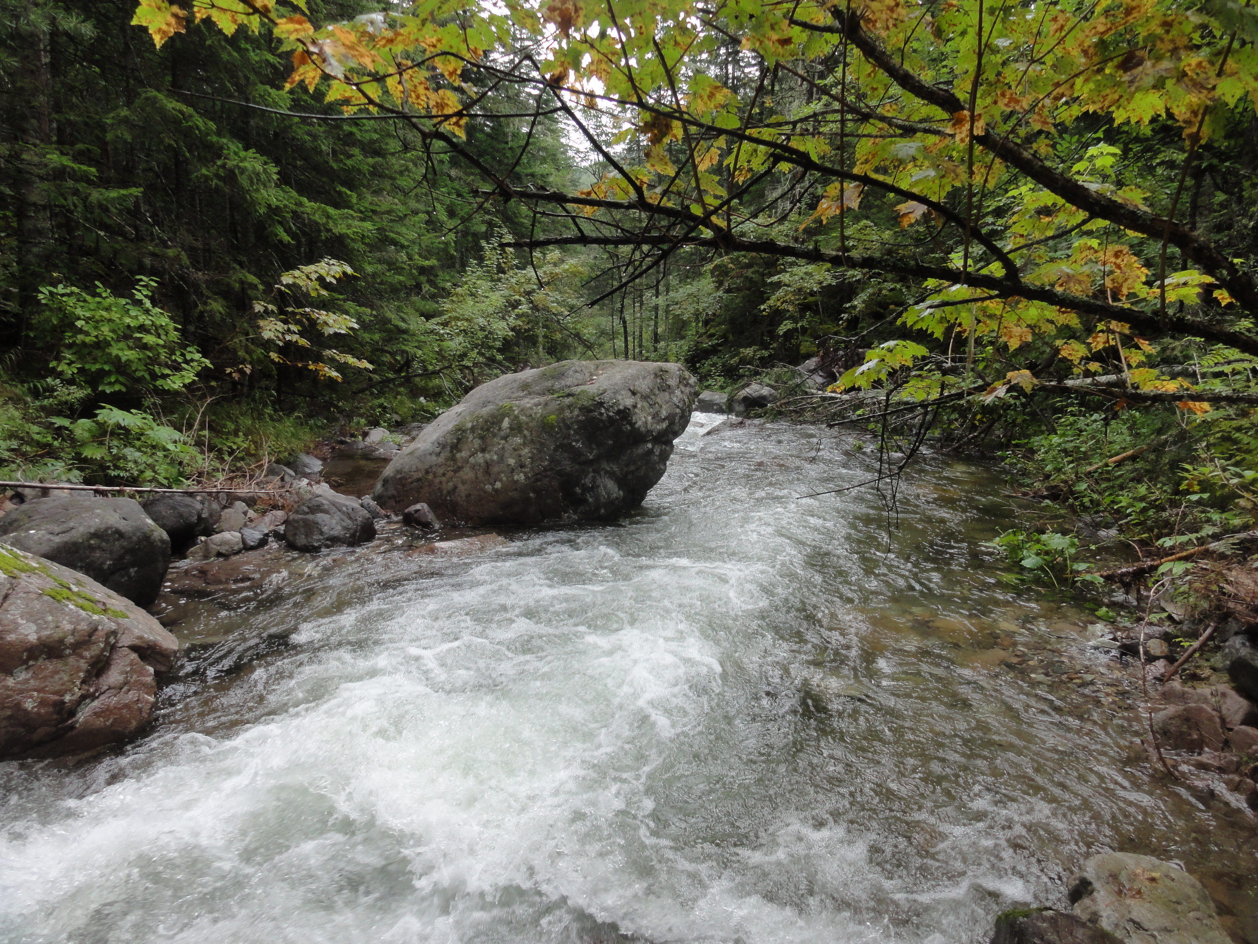 Верхнее течение р. Сред. Амгу между устьем кл. Горбатый и началом каньона Пасть Дьявола.